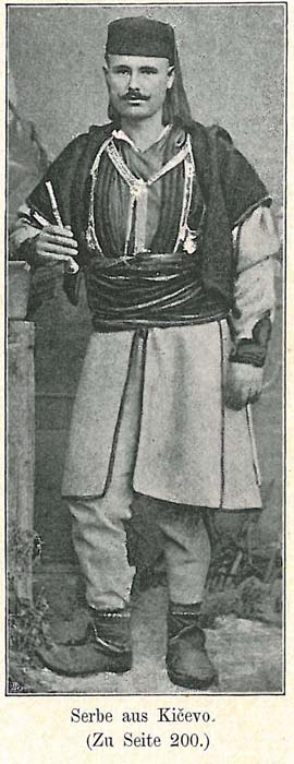 Македонец од Кичево, Битолски Вилает, слика од рускиот весник „Весник и библиотека за самообразование“ од 1903 година